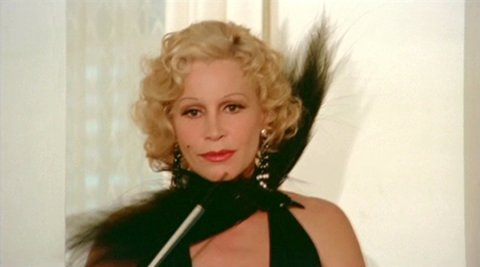 Ingrid Thulin a Kitty szalon / Madame Kitty (Salon Kitty) c. filmben